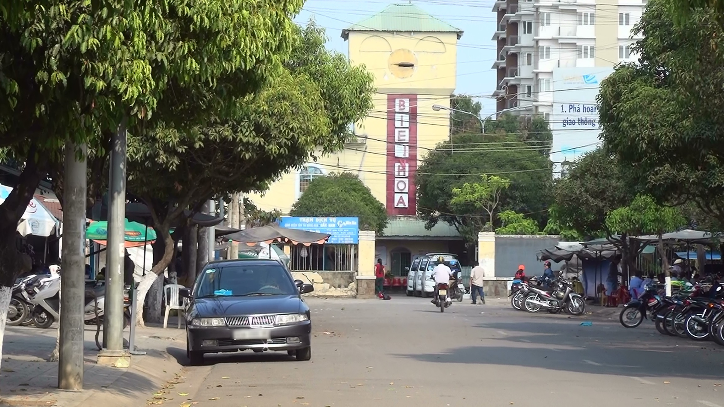 ベトナム南北統一鉄道ビエンホア駅